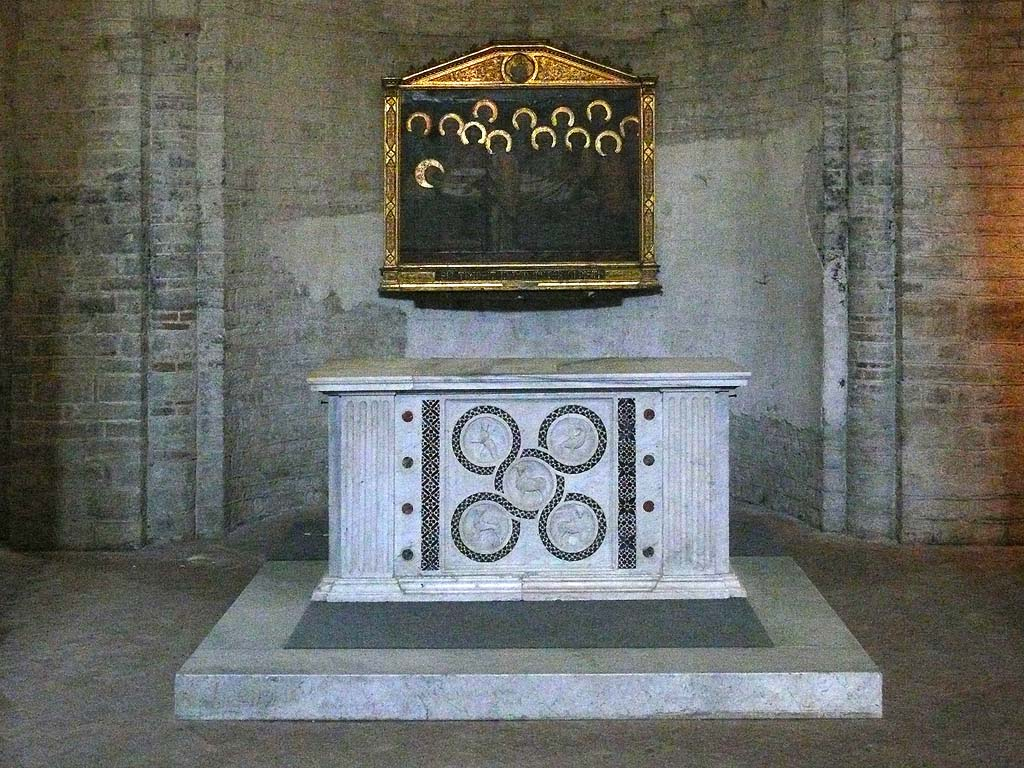 Spoleto: Santa Eufemia, altar